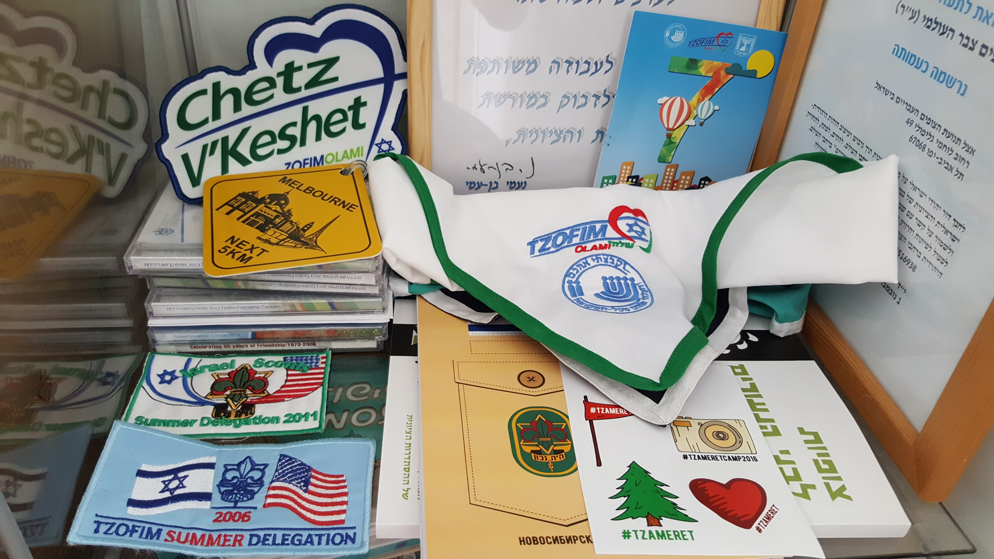 פריטי ארכיון במטה צופי צבר בתל-אביב